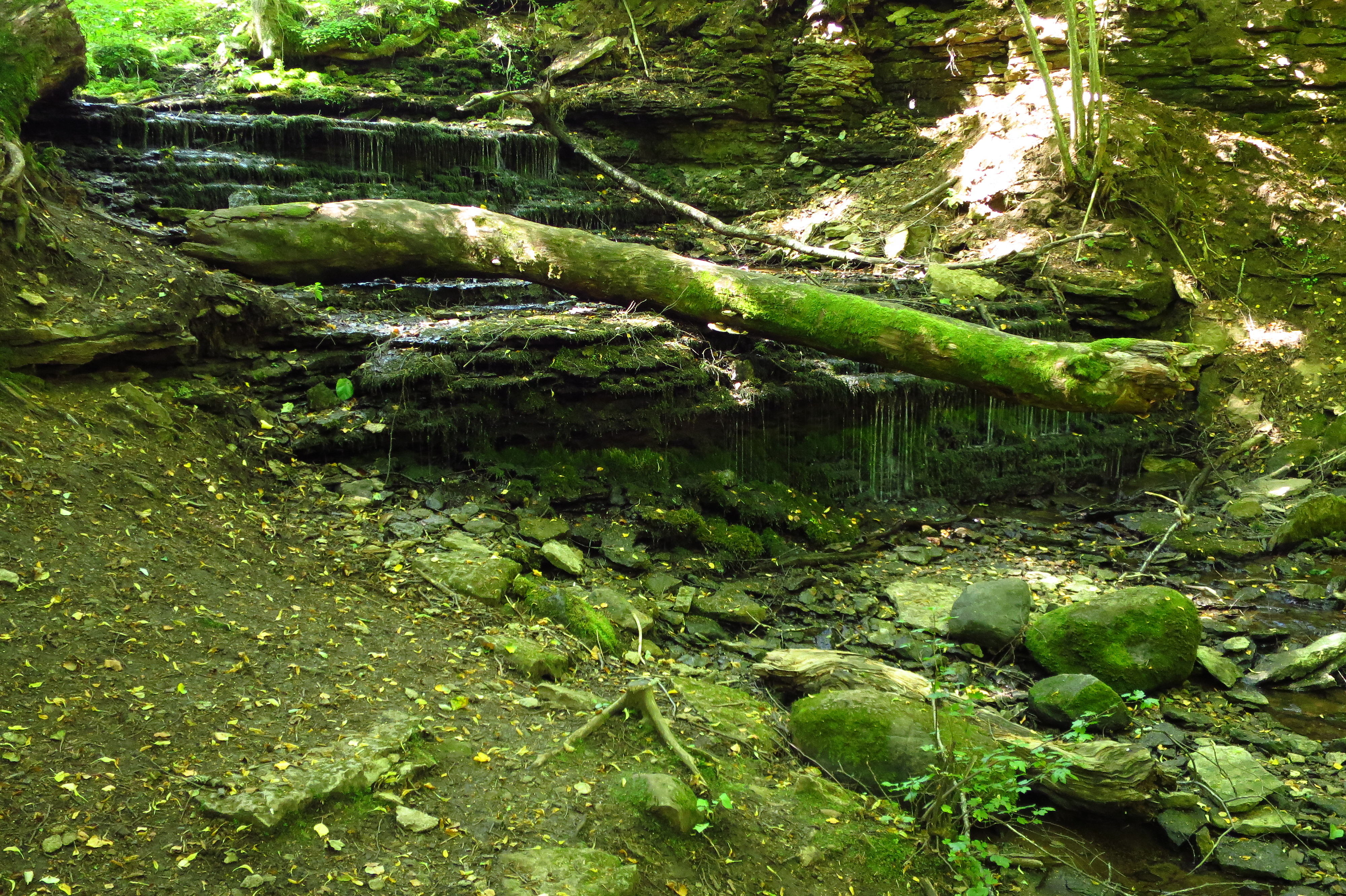 Vasaristi juga Vasaristi ojal Lahemaa rahvuspargis